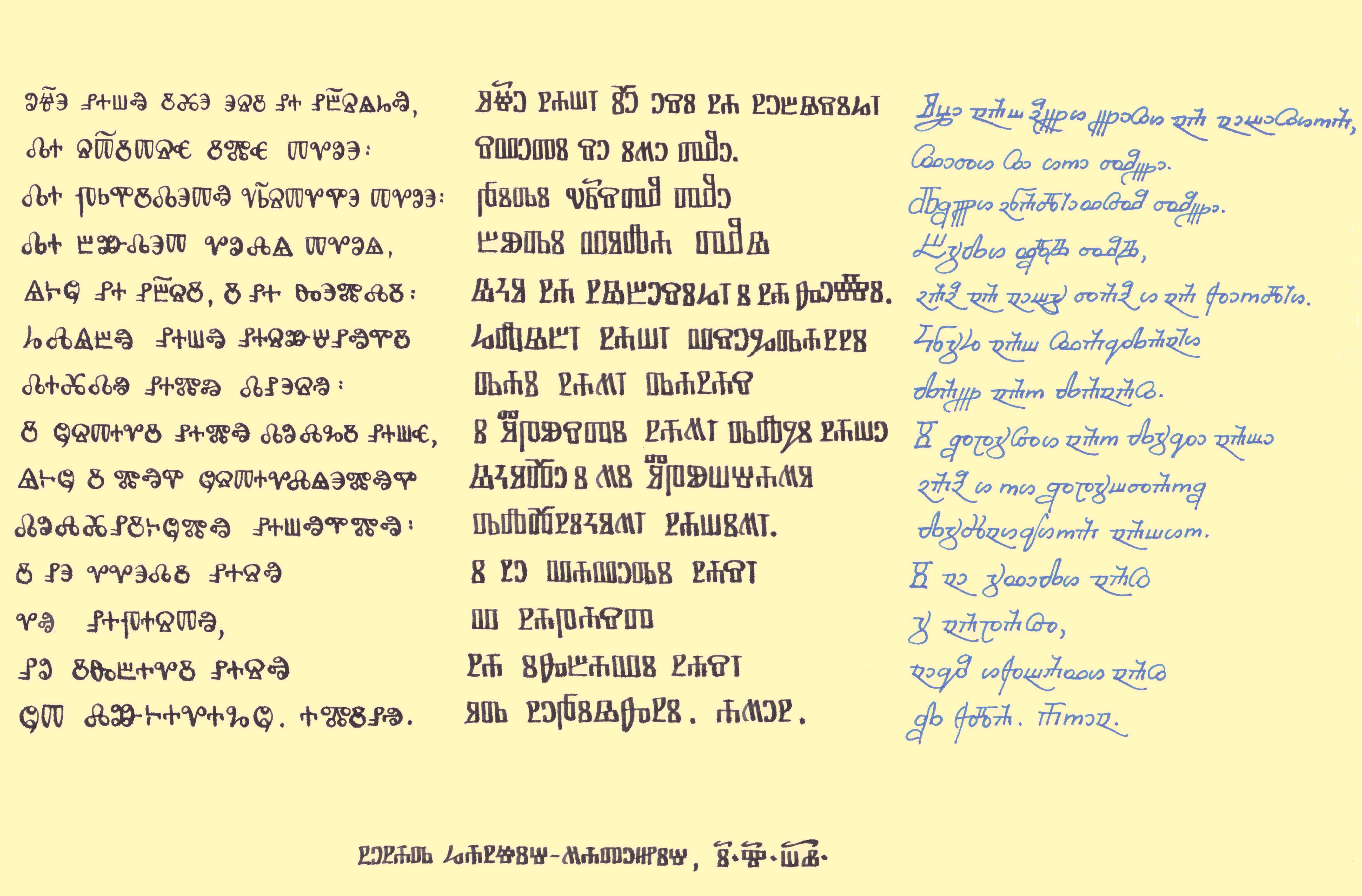 Das "Vater unser" in einem glagolitischen Schriftvergleich; auf der linken Seite in der ursprünglichen runden Glagoliza, in der Mitte in der kroatischen eckigen Glagoliza und auf der rechten Seite in der kroatischen glagolitischen Kursivschrift.